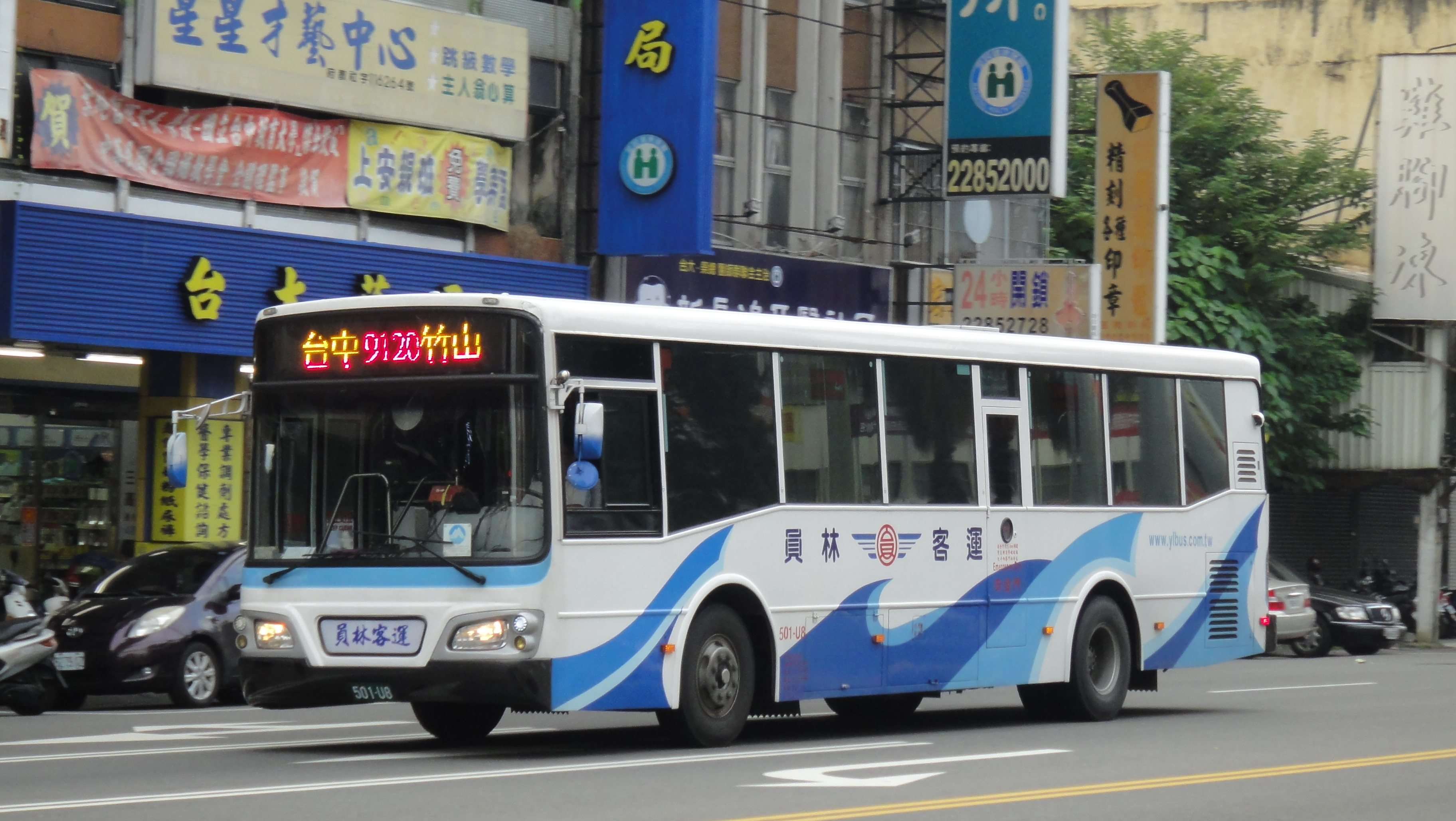 中文（台灣）: 員林客運日野大客車501-U8(原台北客運轉籍車輛)